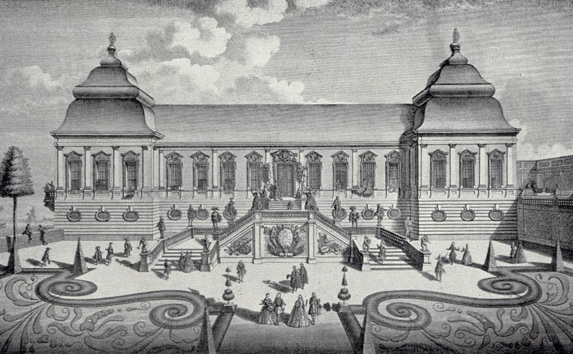 "Prospect des Garten-Gebäudes samt einer mit allerhand musikalischen Statuen besetzten Treppen" - Frontansicht des Schlösschens in der Favorite nach einem Stich von Salomon Kleiner, 1726